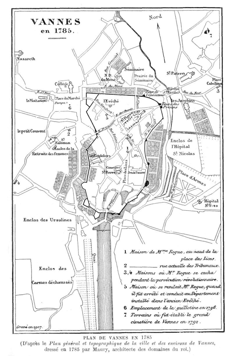 p.1 de Un martyr de la Révolution à Vannes, Pierre-René Rogue Prêtre de la Mission de Saint-Vincent de Paul (1758-1796), Léon Brétaudeau, Desclée De Brouwer et Cie, 1908.